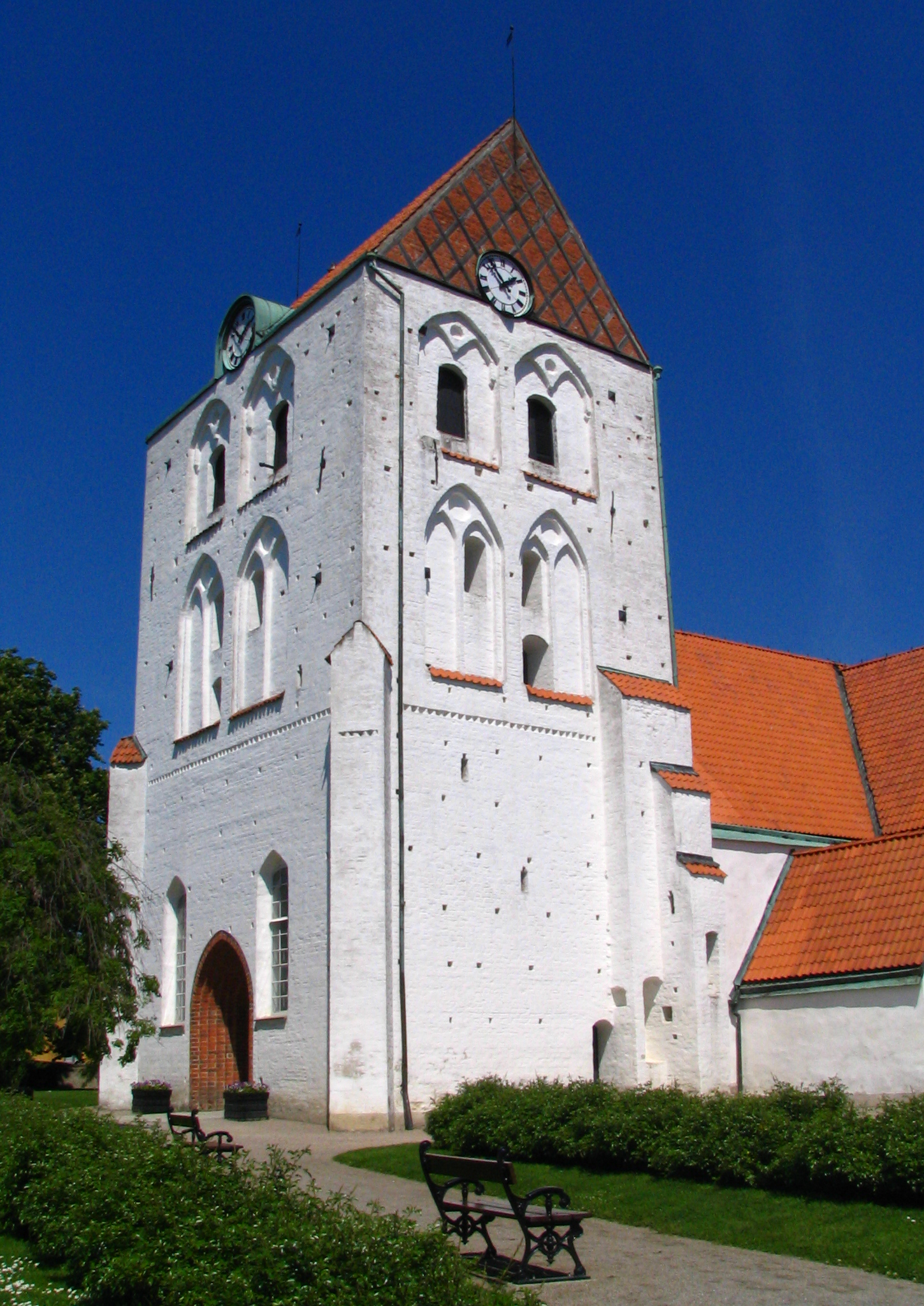 Außenansicht der Heilig-Kreuz-Kirche